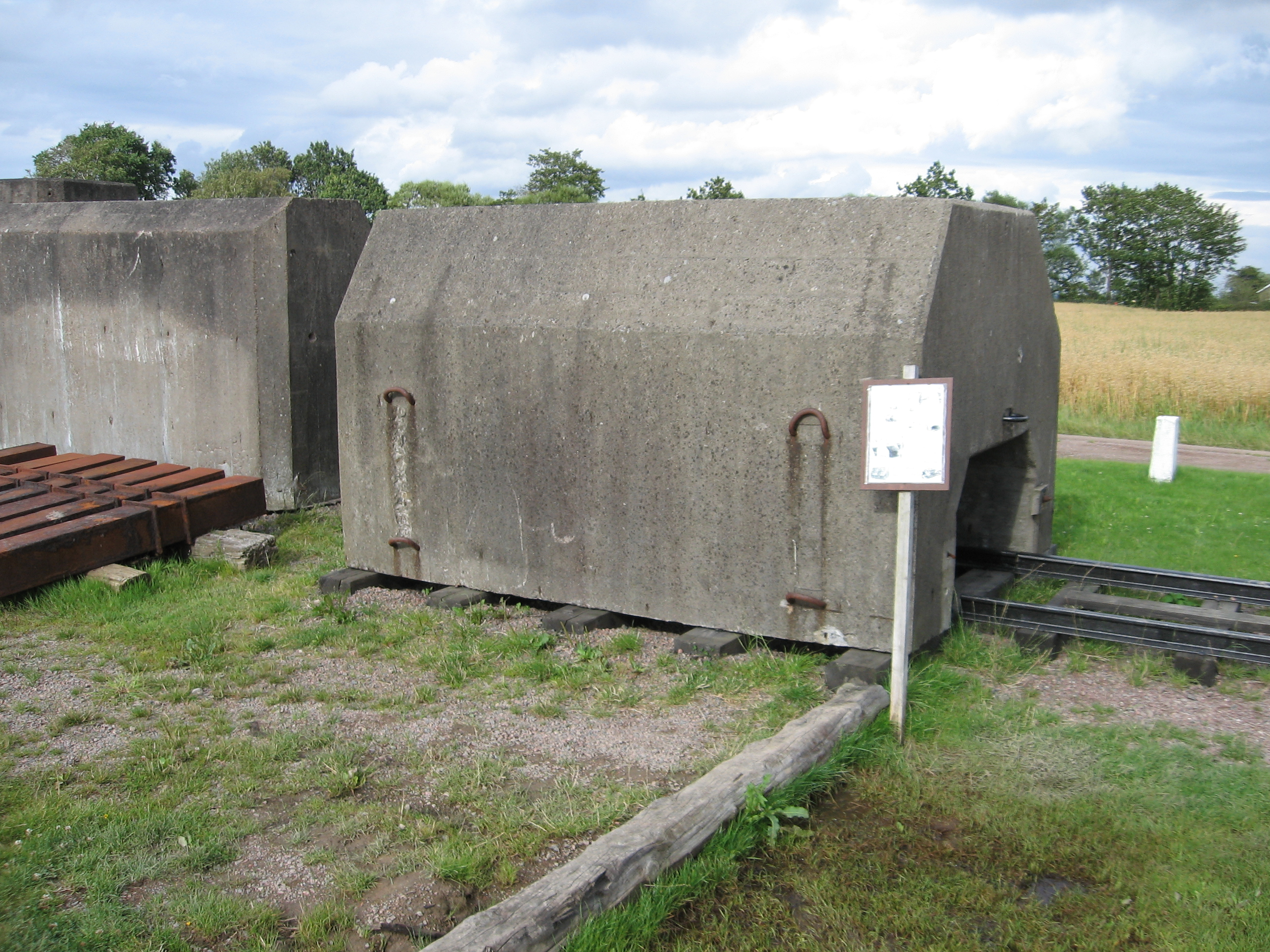 Stridsvangshinder